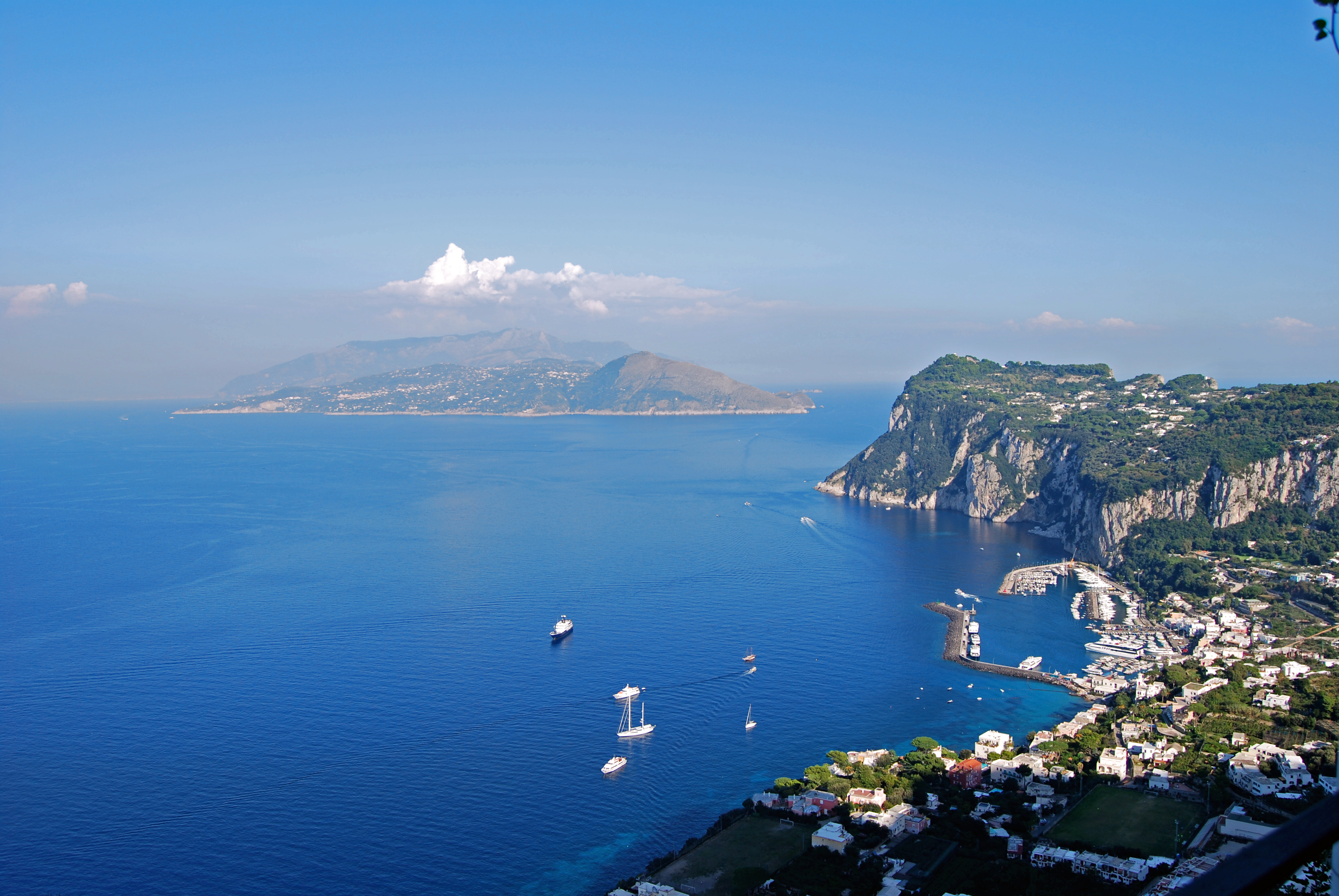 Panorama da Villa San Michele, Anacapri